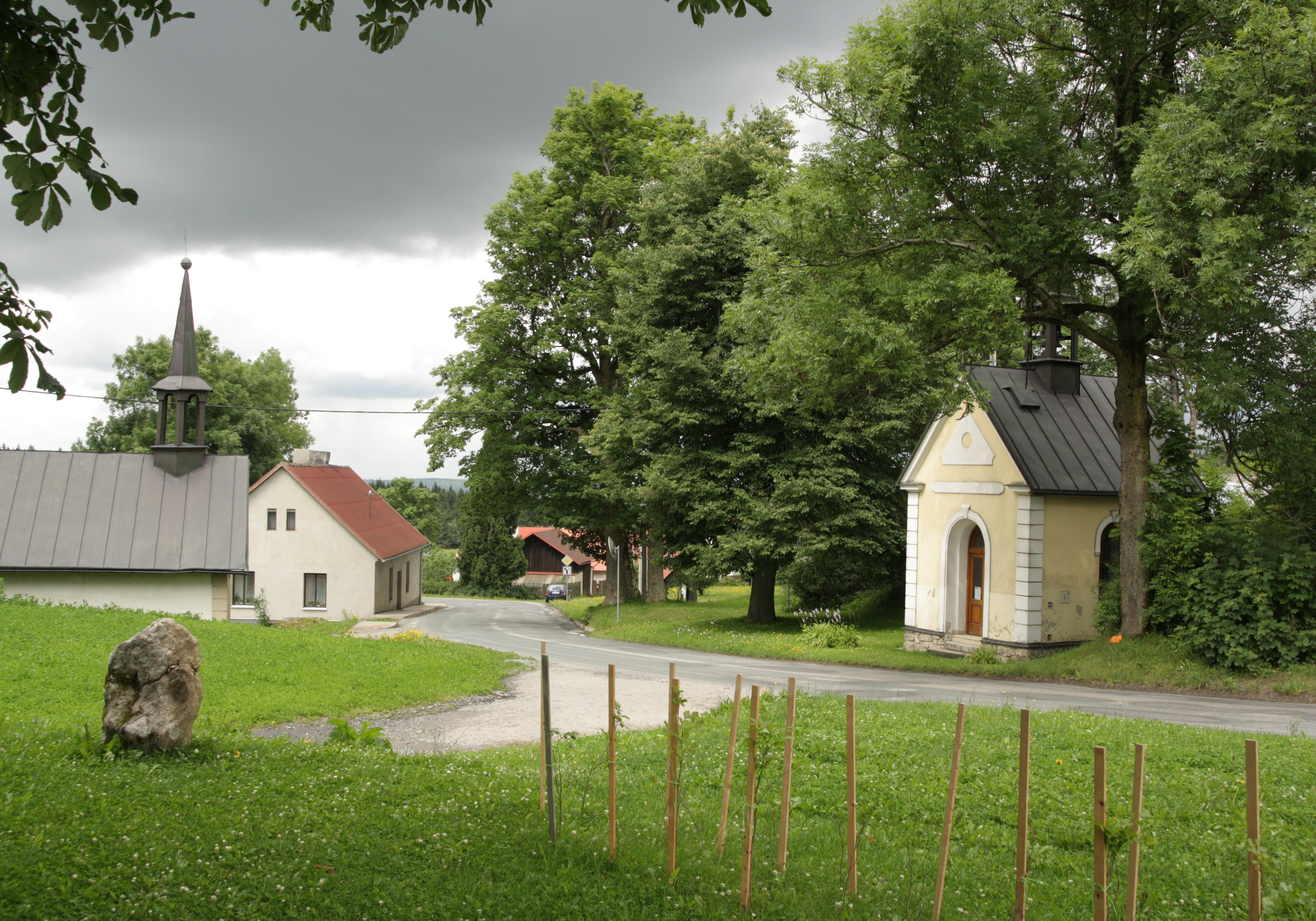 Sklené (okres Žďár nad Sázavou) - východní část obce, kaple